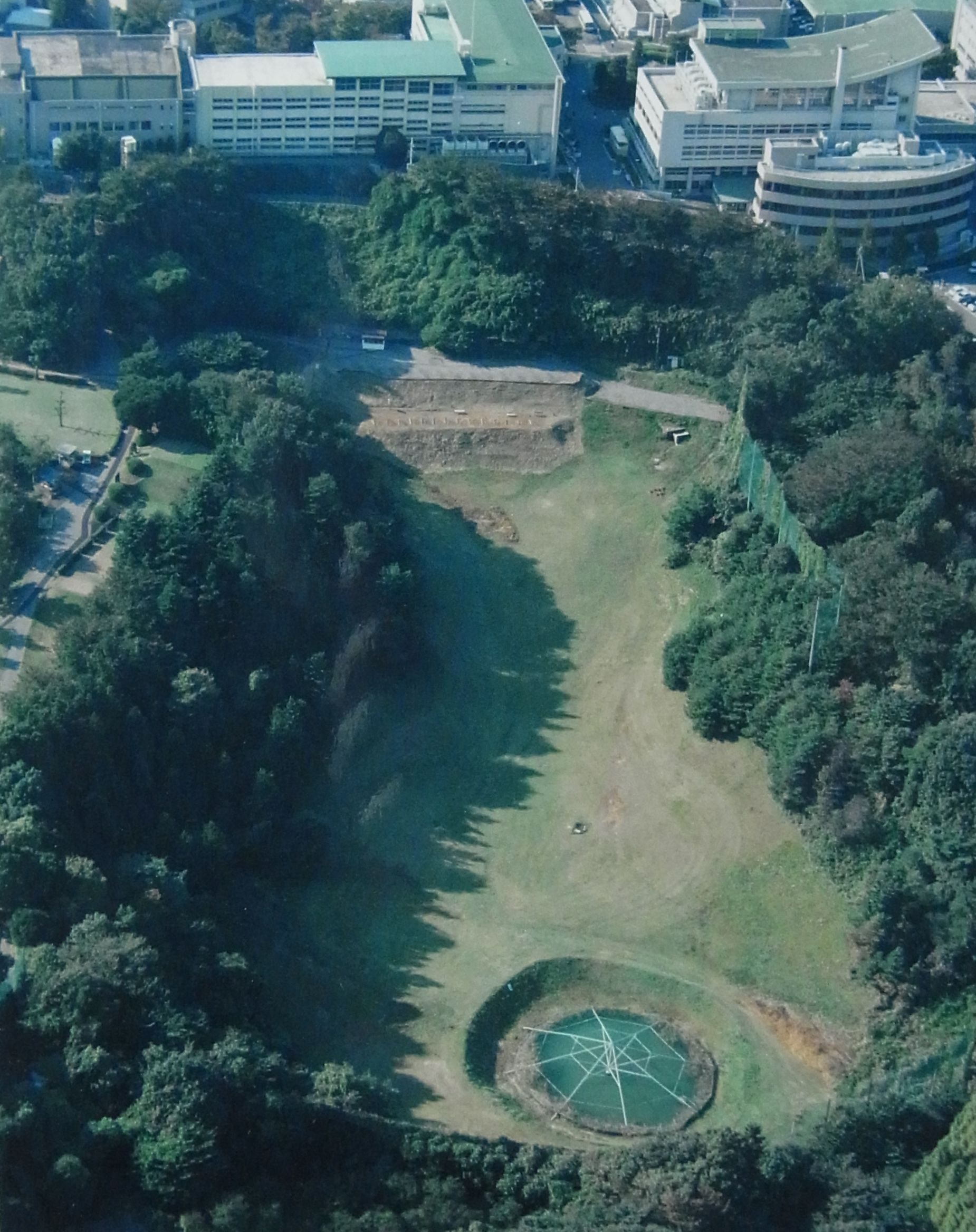 川崎市岡本太郎美術館の敷地の航空写真